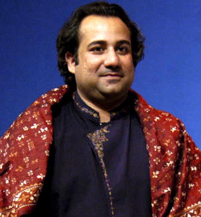 Rahat Fateh Ali Khan